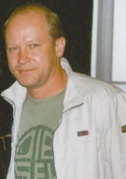 Photo de l'entraÃ®neur de football Ivan Hasek lors de la saison 2006-2007. Cette photo Ã Ã©tÃ© prise par MickaÃ«l Roure alias Altrensa pour WikipÃ©dia. Elle ne saurait Ãªtre utilisÃ©e sans la mention de son auteur. D'avance merci.